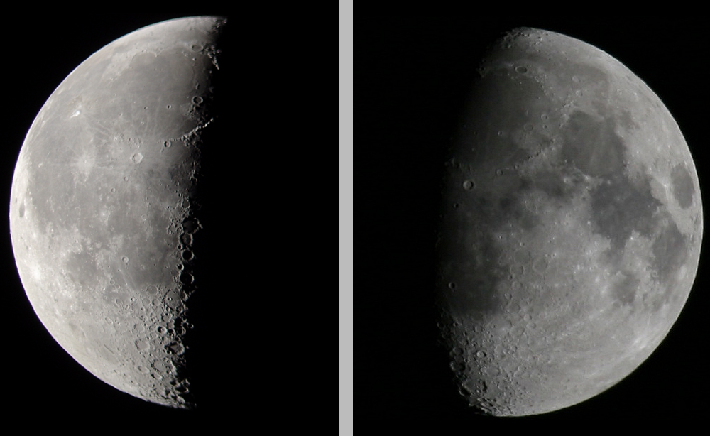 A lua em quarto minguante vista, da esquerda para a direita, pelos hemisférios norte e sul.